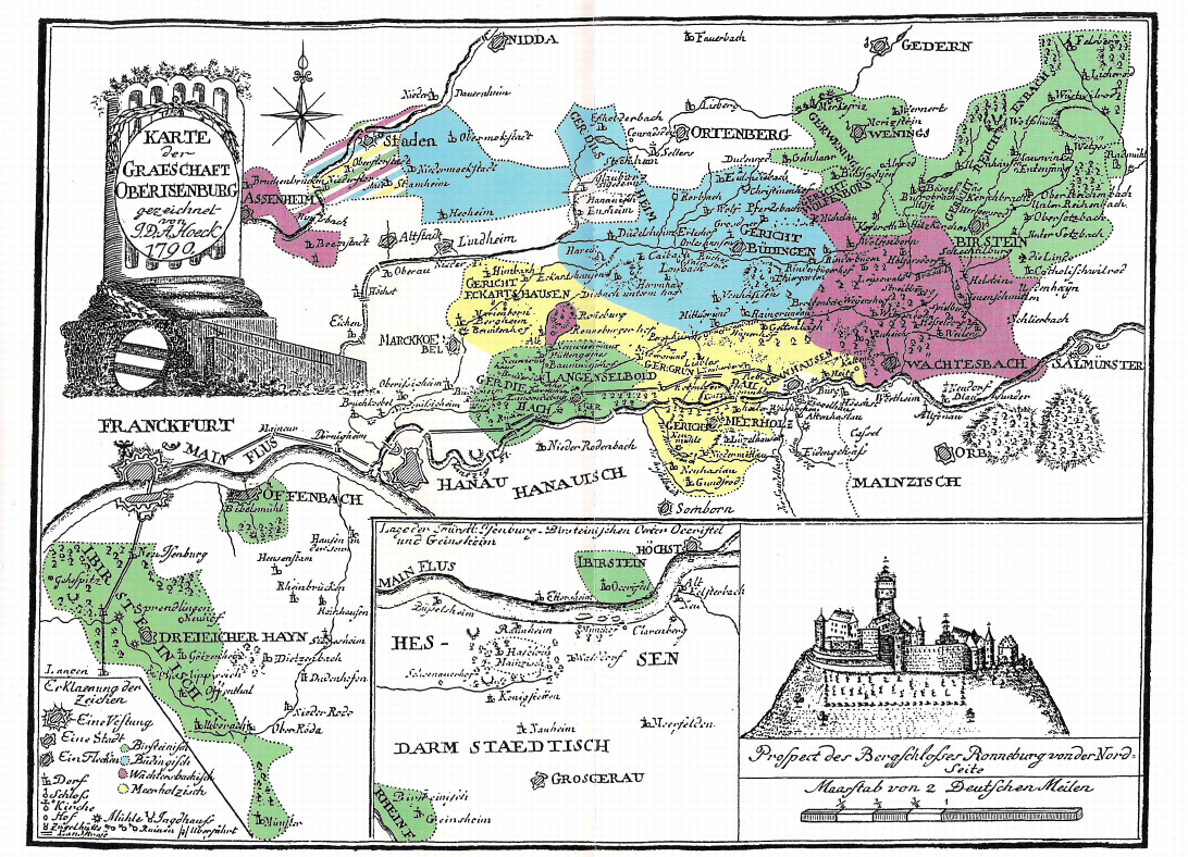 Karte der Grafschaft Oberisenburg (Isenburg-Birstein, Ysenburg-Büdingen-Büdingen, Ysenburg-Büdingen-Meerholz, Ysenburg-Büdingen-Wächtersbach)